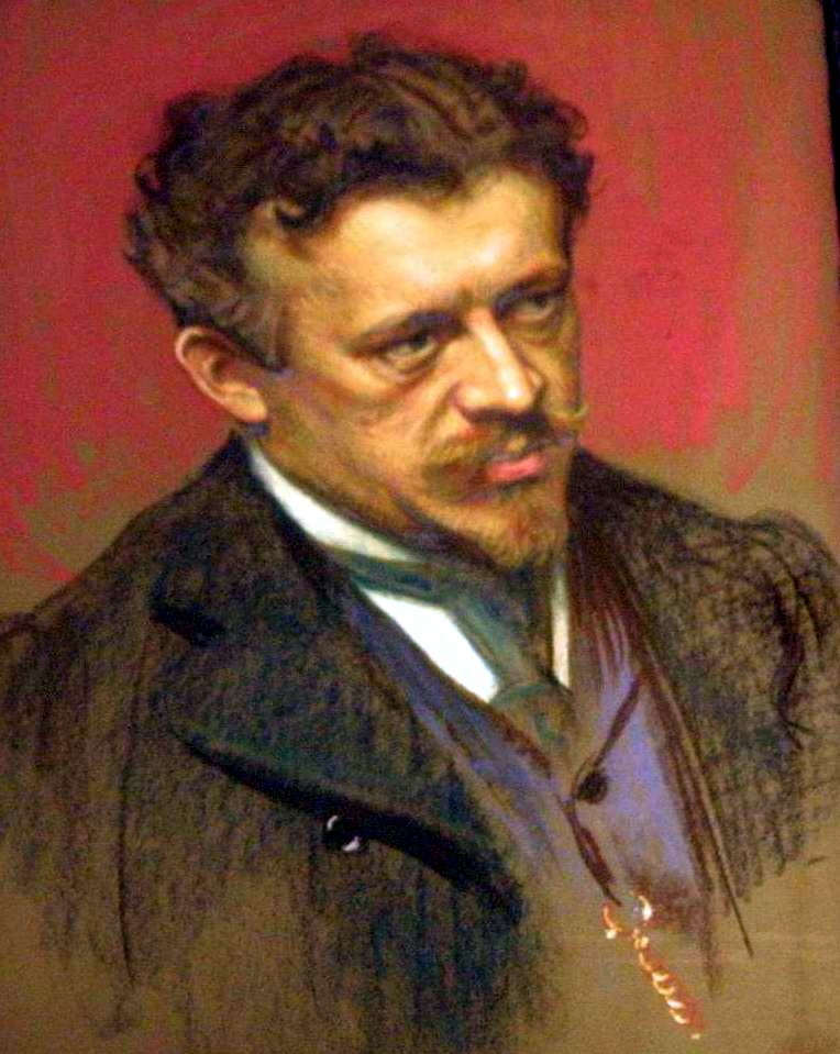 Joseph Langer - portret autorstwa Eduarda Kaempffera (Muzeum Sprzętu Gospodarstwa Domowego w Ziębicach).